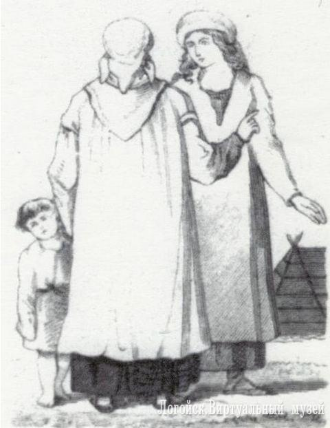 Замалёўка тыпаў сялян Канстанцінам Тышкевічам падчас экспедыцыі па Віліі